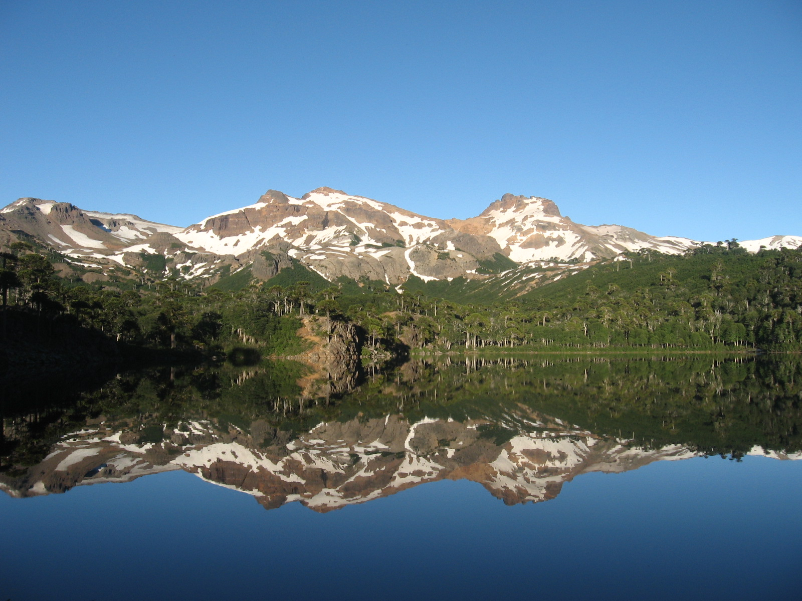 Reserva nacional Ralco